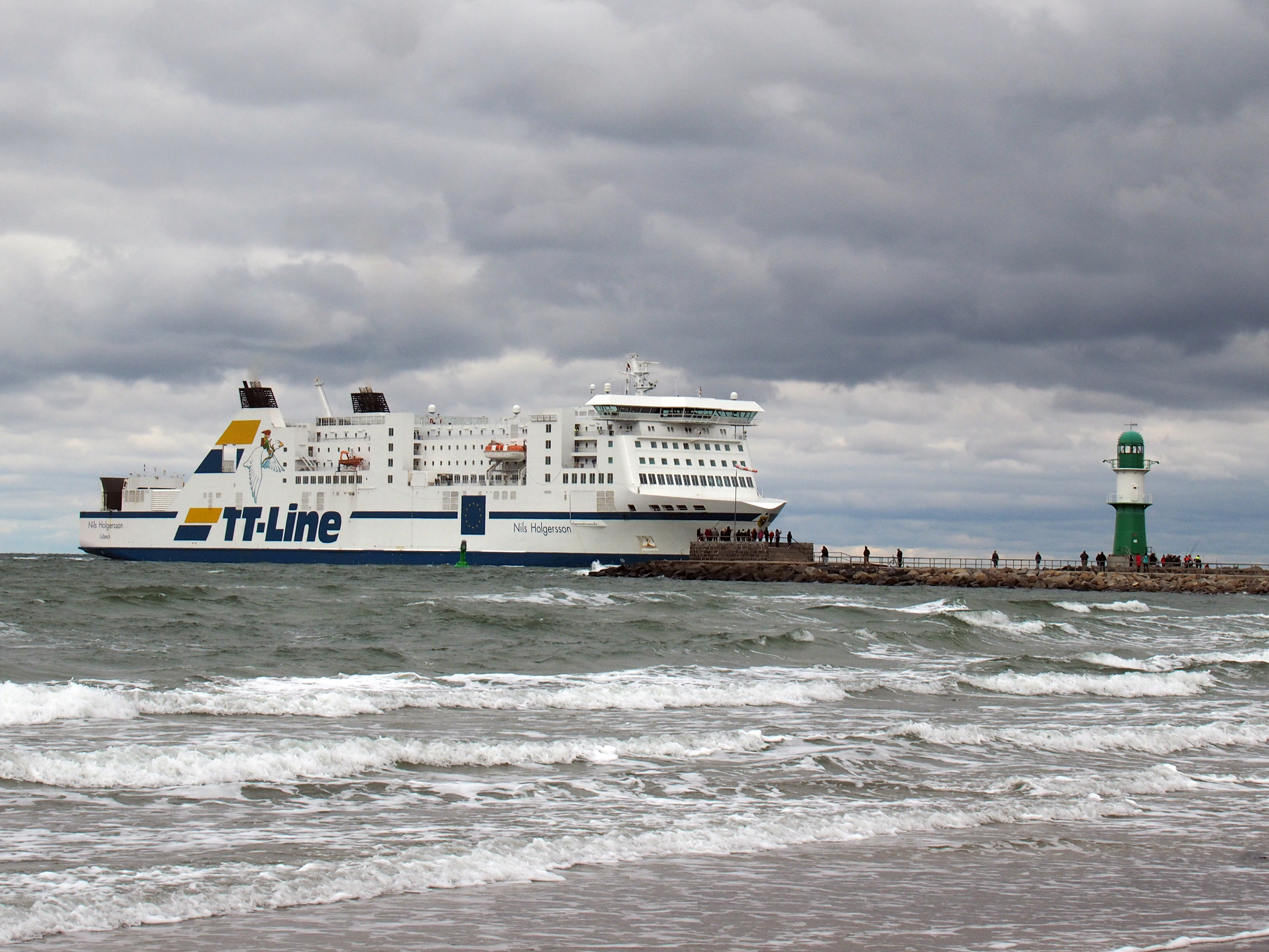 Fähre Nils Holgersson der TT–Line läuft in Warnemünde ein